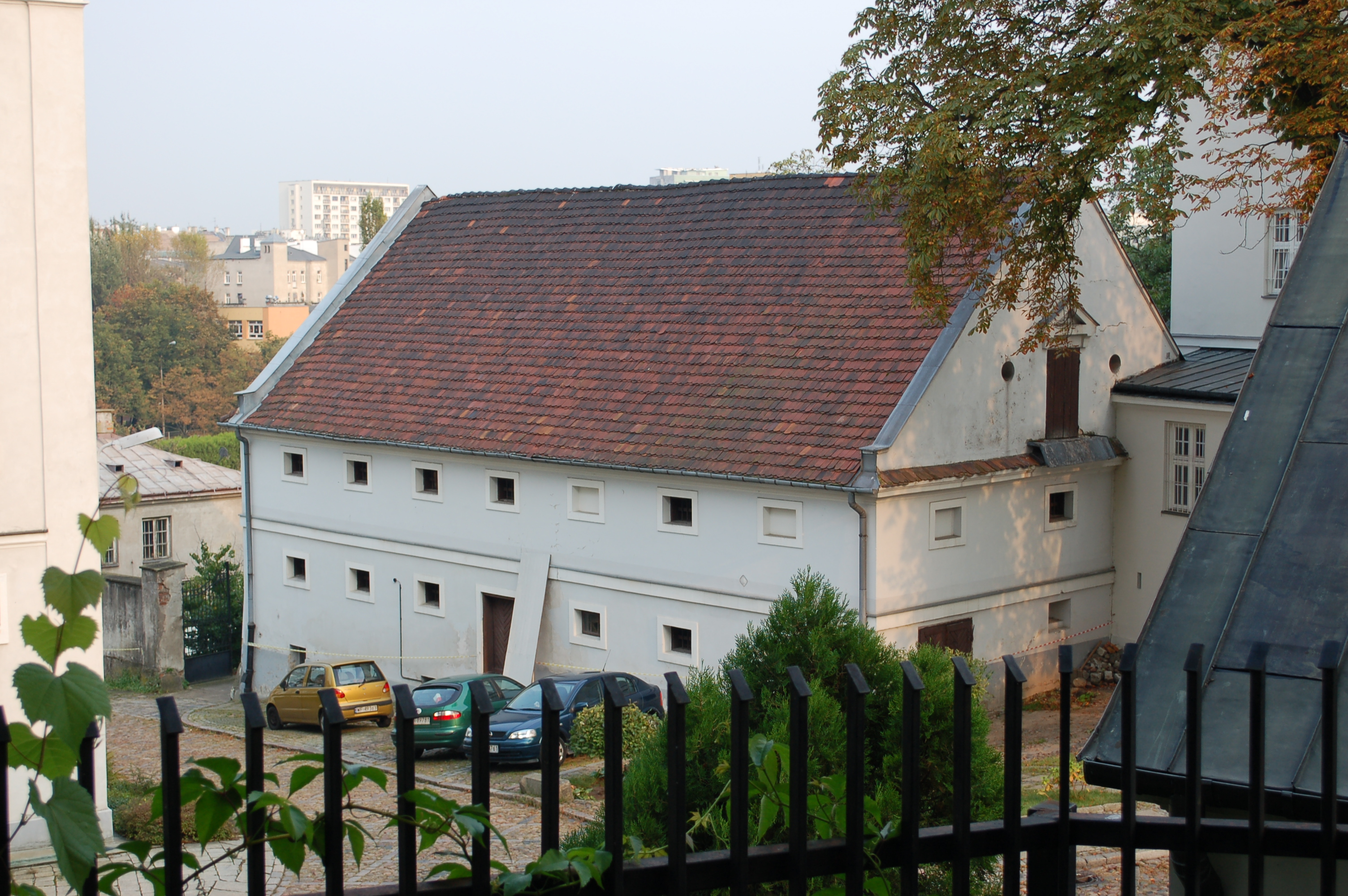 Kloster Warschau